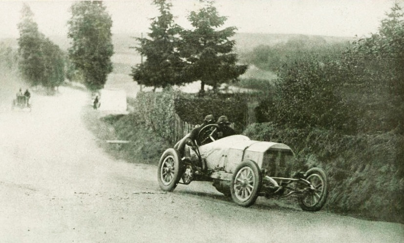 Christian Lautenschlager, vainqueur du Grand Prix de Dieppe sur Mercedes en 1908 - La Vie au Grand Air, le 11 juillet 1908, p.41